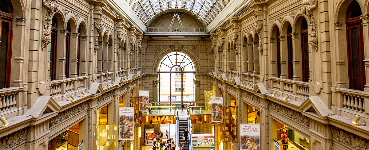 Interior de las Galerías Pacífico.